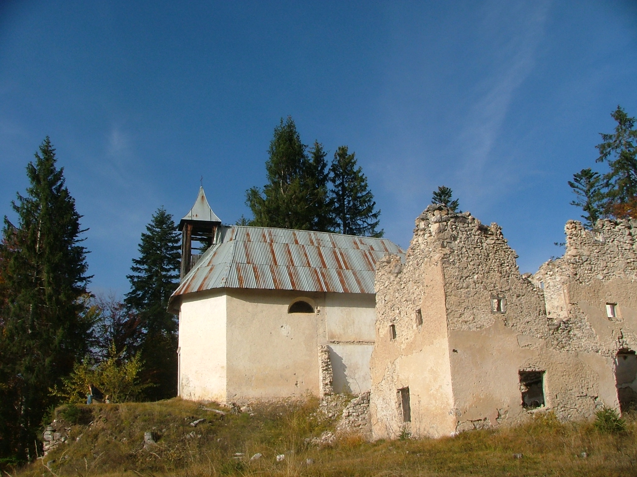 Eremo dei Romiti,insieme